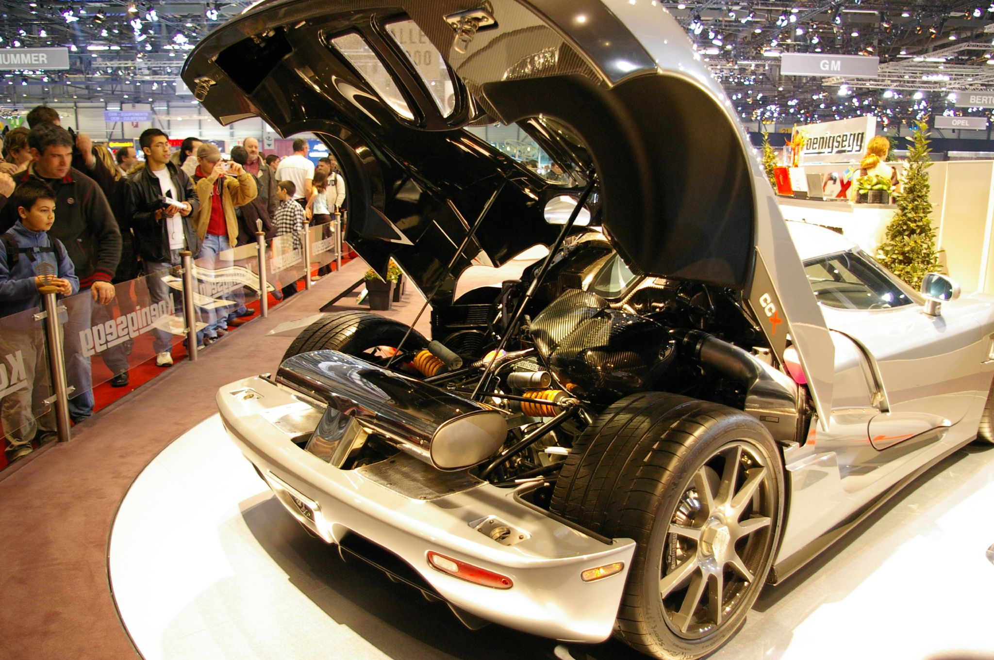 Koenigsegg CCX